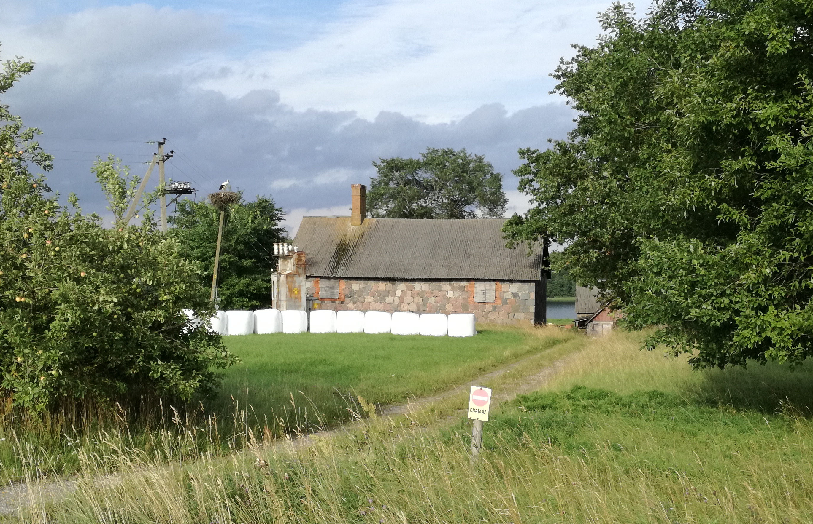 Aindu karjamõisa ait-kuivati pildistatuna Viljandi teelt